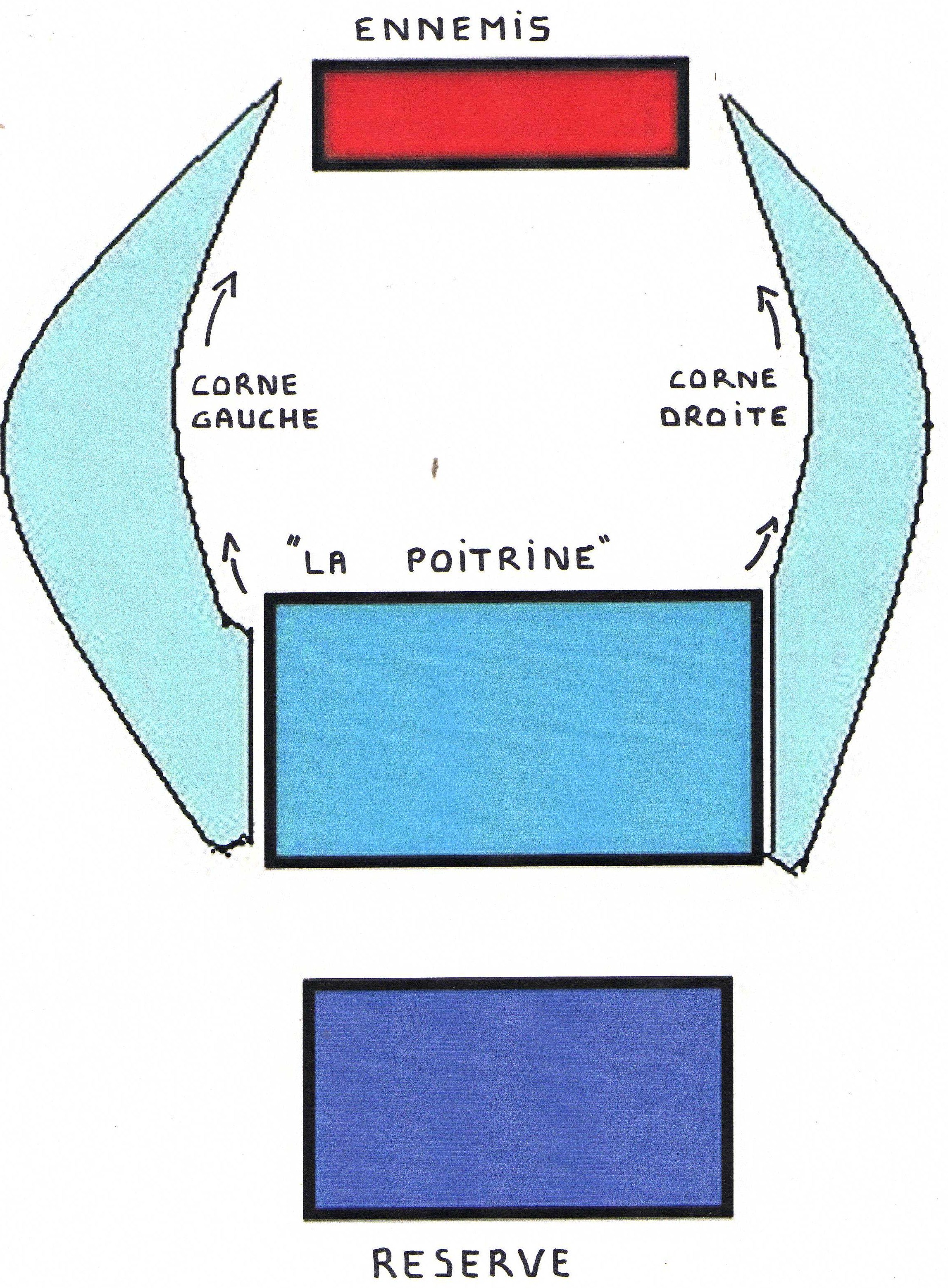 Schéma de la tactique employée par les Zoulous sur le champ de bataille